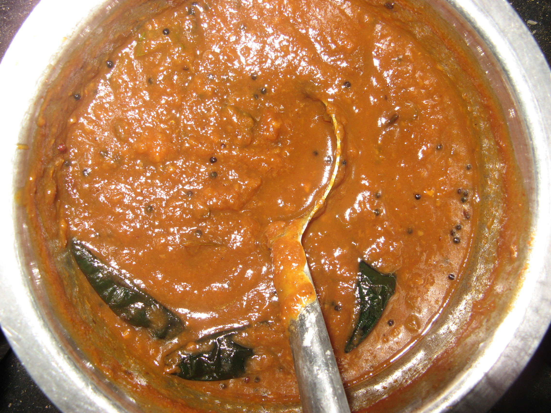 ഇഞ്ചി കറി